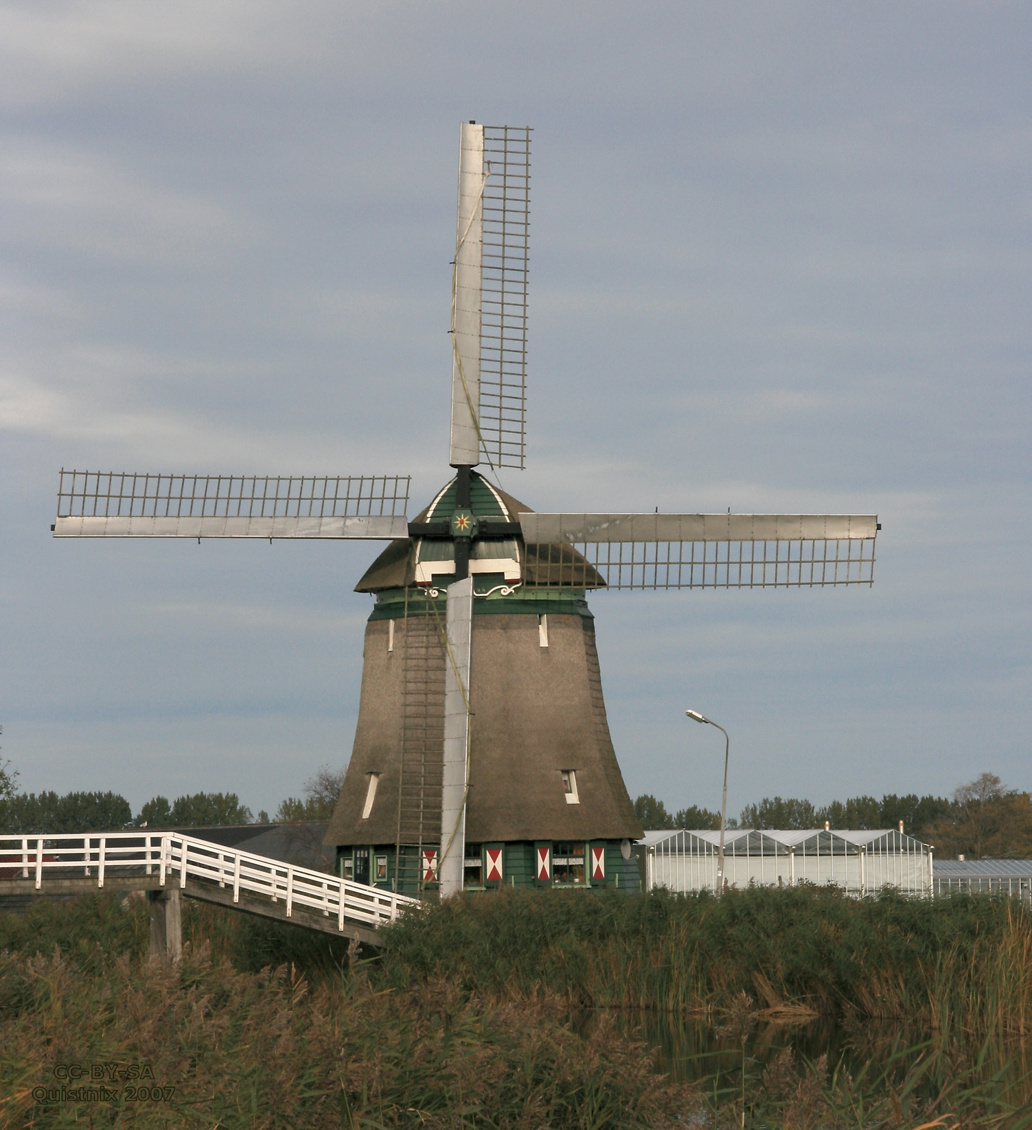 Hensbroek: windmolen Polder Hensbroek